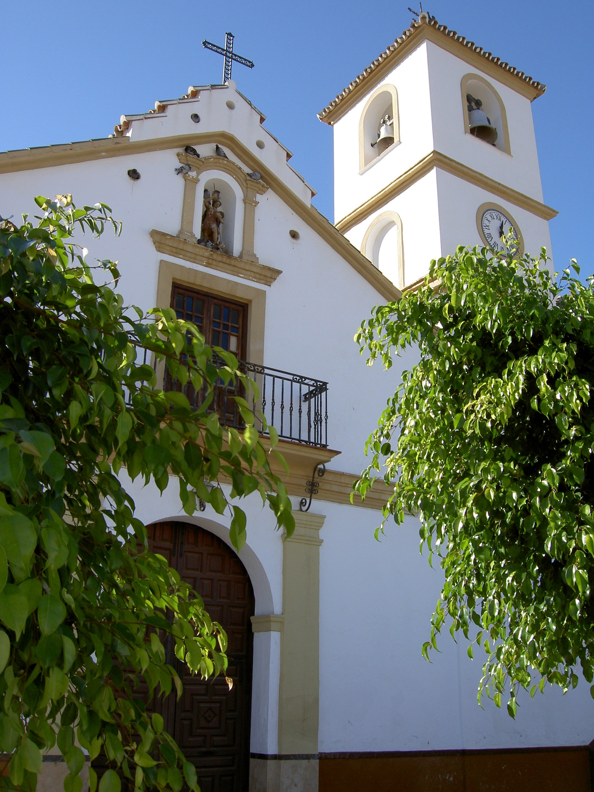 Kerk van San Miguel, Guaro, prov. Málaga, Spanje (San Miguel church, Guaro)